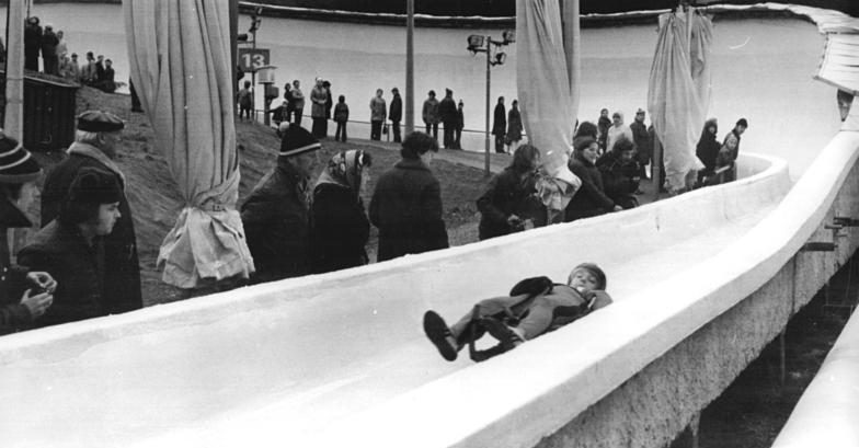 Oberhof, DDR-Juniorenmeisterschaften im Rennschlitten ADN-ZB Schaar str-4.1.1975-Oberhof: DDR-Meisterschaften im Rennschlitten-Mit regem Interesse verfolgen die Zuschauer die Läufe der Junioren am ersten Wettkampftag dieser DDR-Meisterschaften.